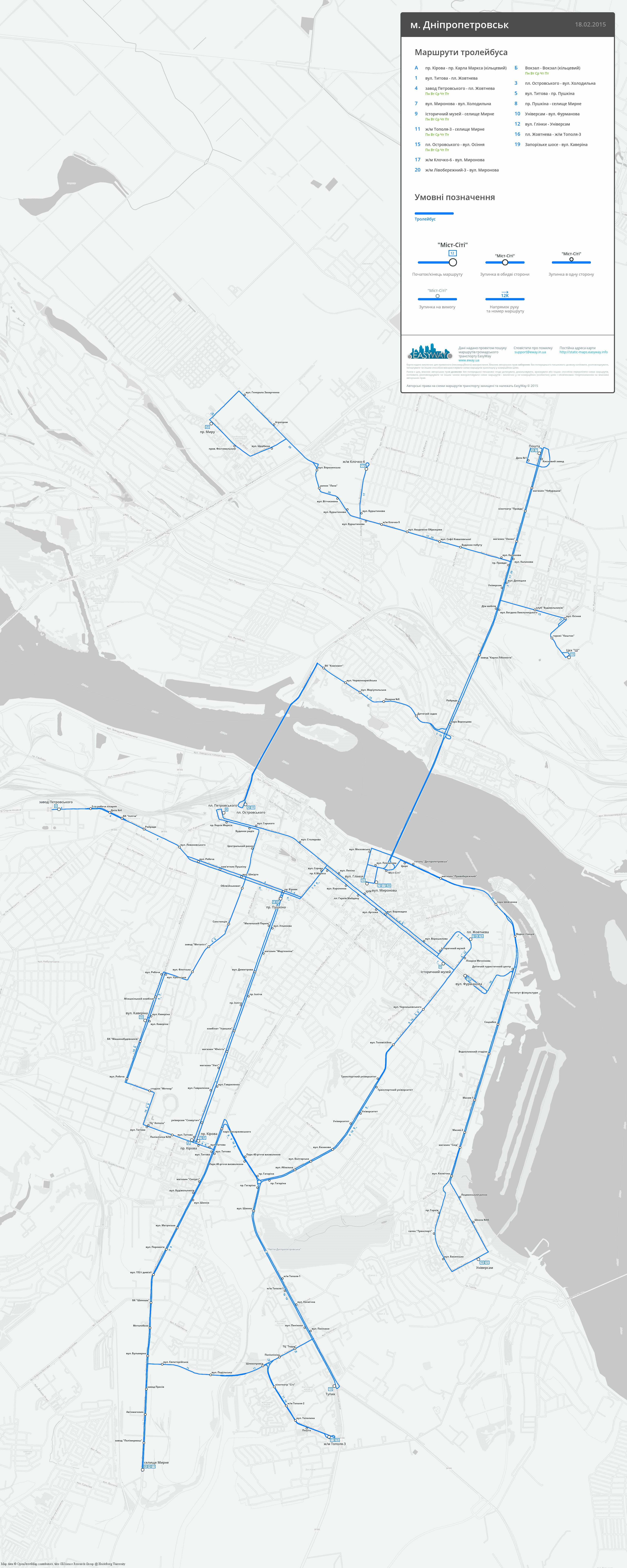 Схема тролейбусних маршрутів у місті Дніпропетровськ